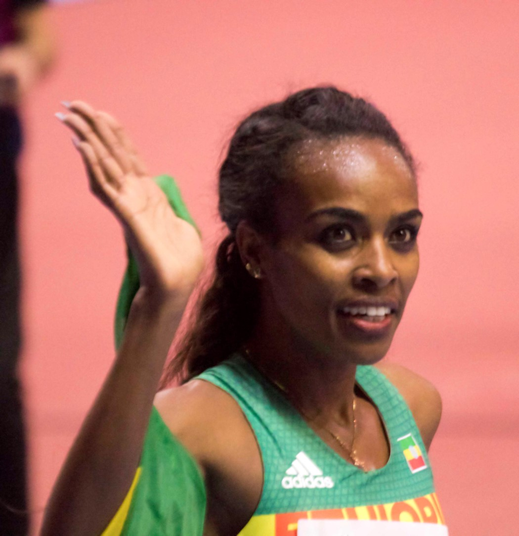 WK3B0305 dibaba